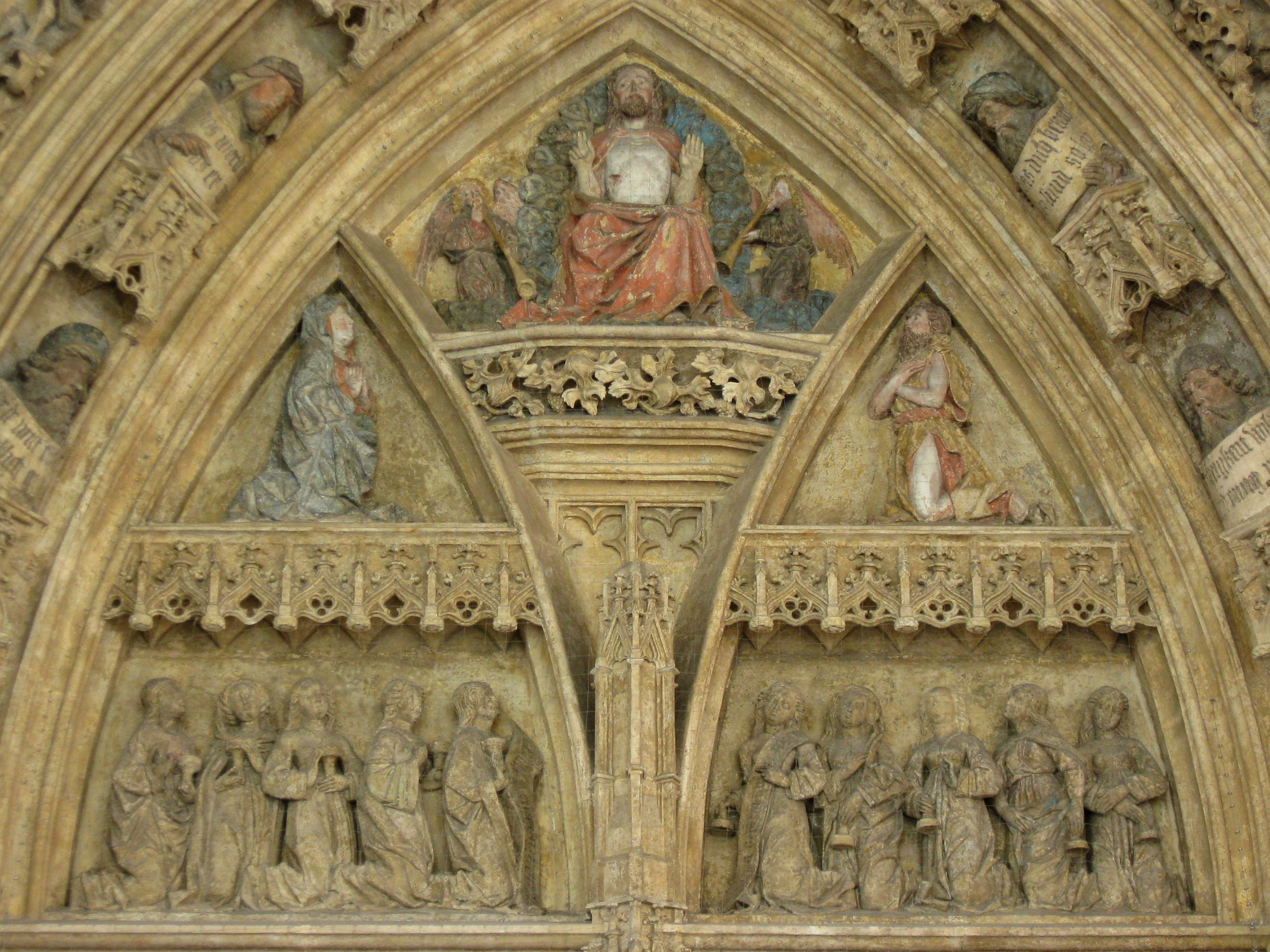 Heilig-Geist-Gasse 394; Ehem. katholische Spitalkirche Heiliggeist, Portal. D-2-61-000-229